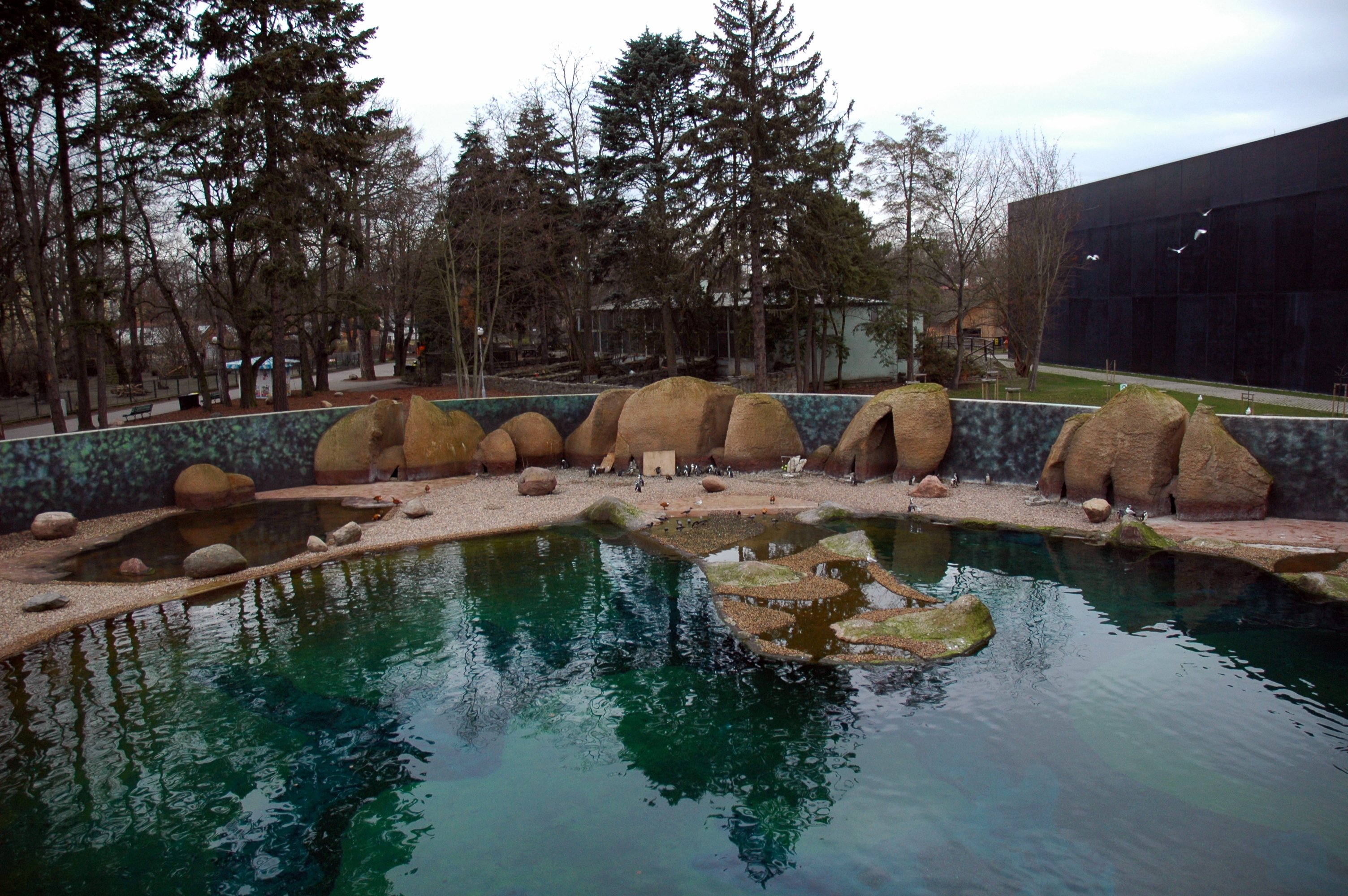 Zoo we Wrocławiu